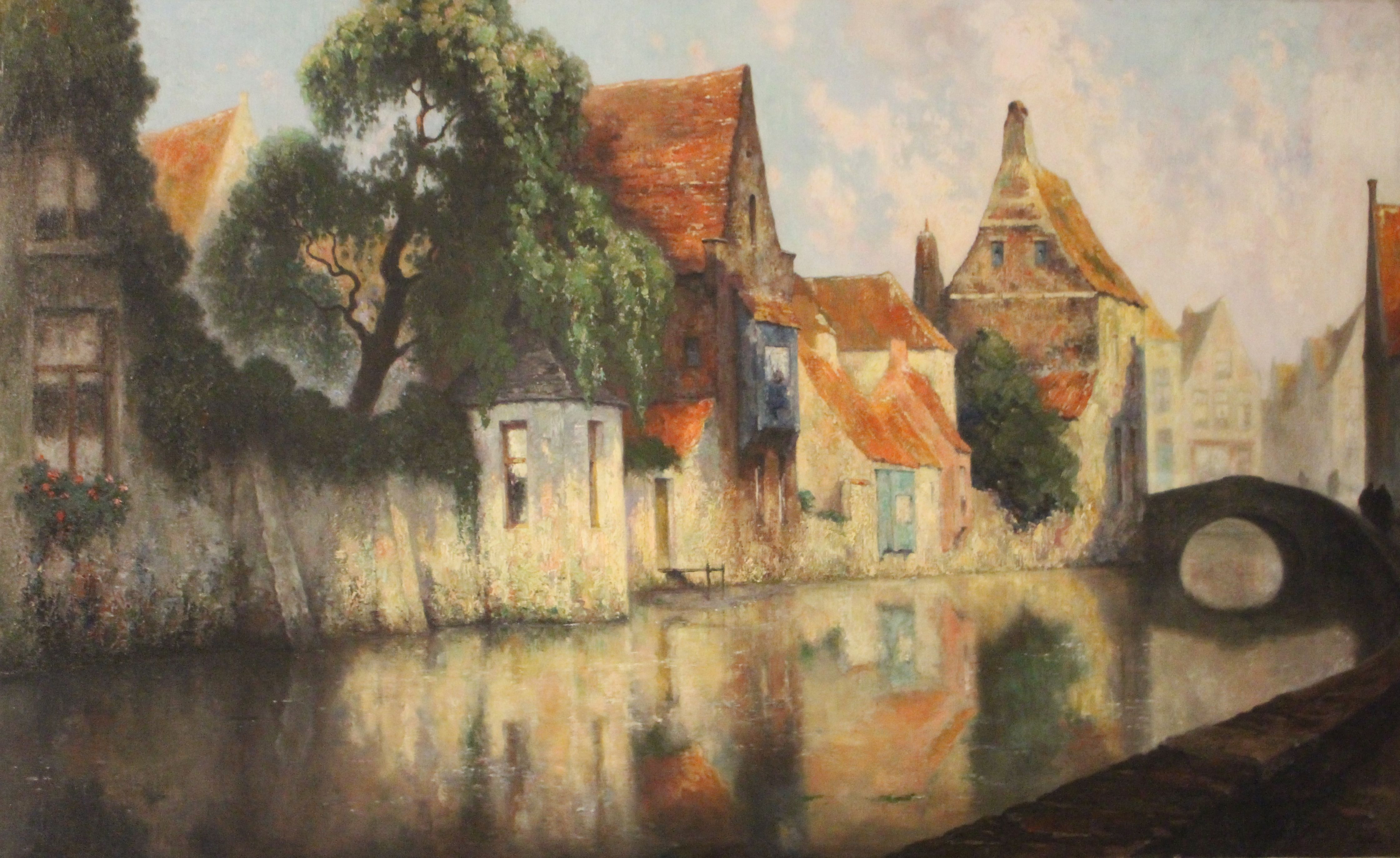 Quai de la Main d'or (Bruges). Julien Célos. Huile sur toile. 80 x 130 cm. Collection privée.